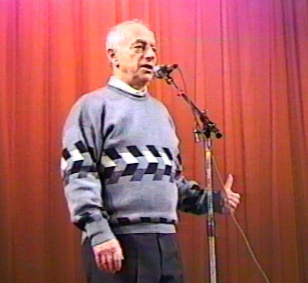 А. Городницкий А. Городницкий.